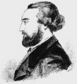 Prevost, Hippolyte Gravure d'Hippolyte Prévost. Etant donné qu'il est décédé en 1873, et que c'est une image scannée : c'est image est donc dans le domaine public. De plus, j'ai retravaillé l'image avec le logiciel The Gimp (niveau, pinceau, plugin GREYCstoration, puis luminosité).